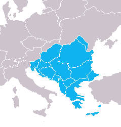 Basiert auf GFDL-Vorlage